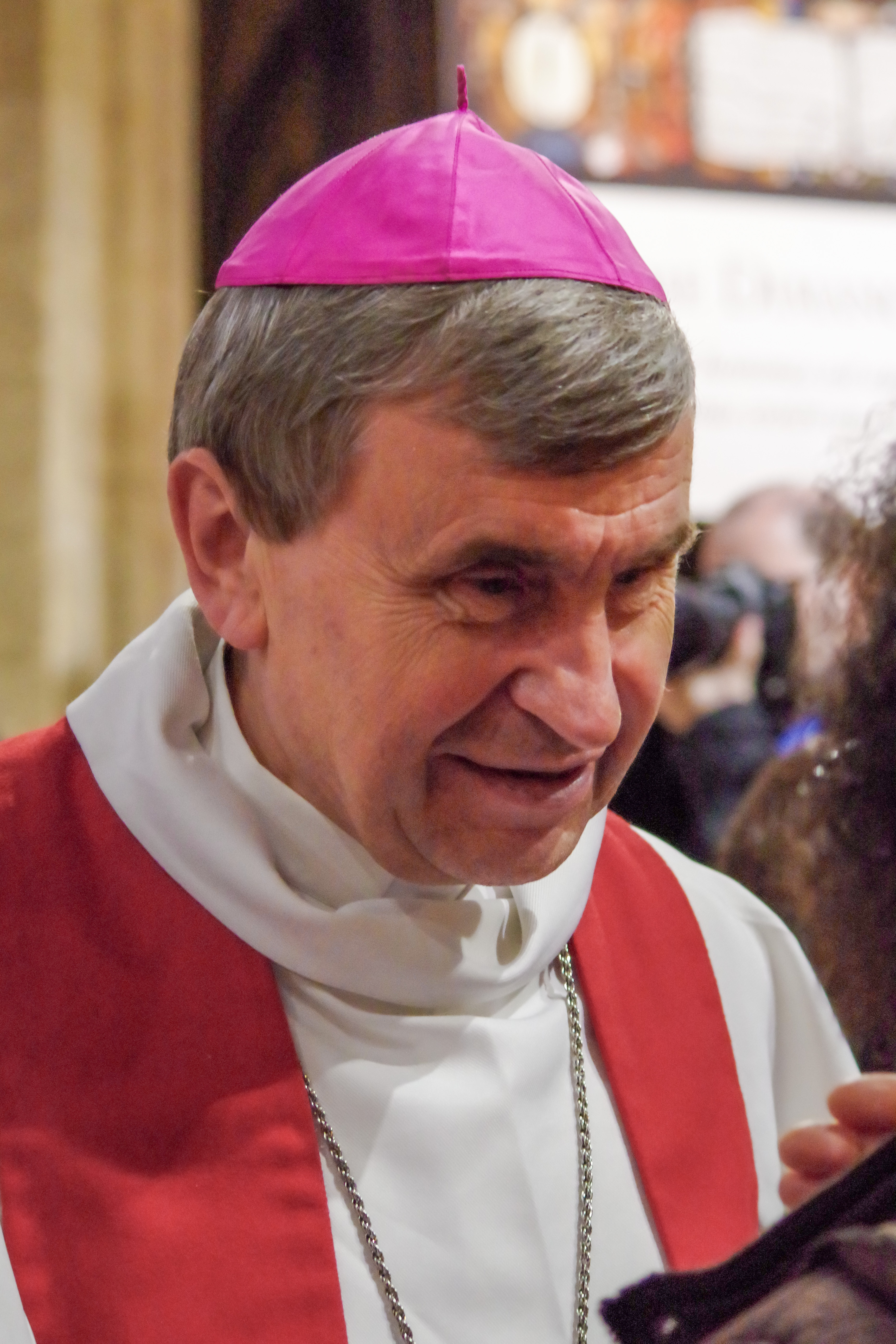 Mgr Pascal Delannoy à la veillée de prière pour la vie en mai 2015 en la cathédrale Notre-Dame-de-Paris